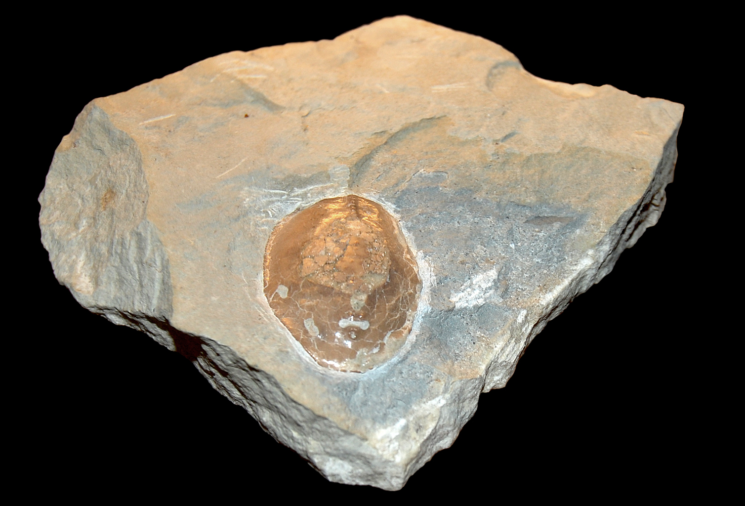 Naturhistorisches Museum Wien